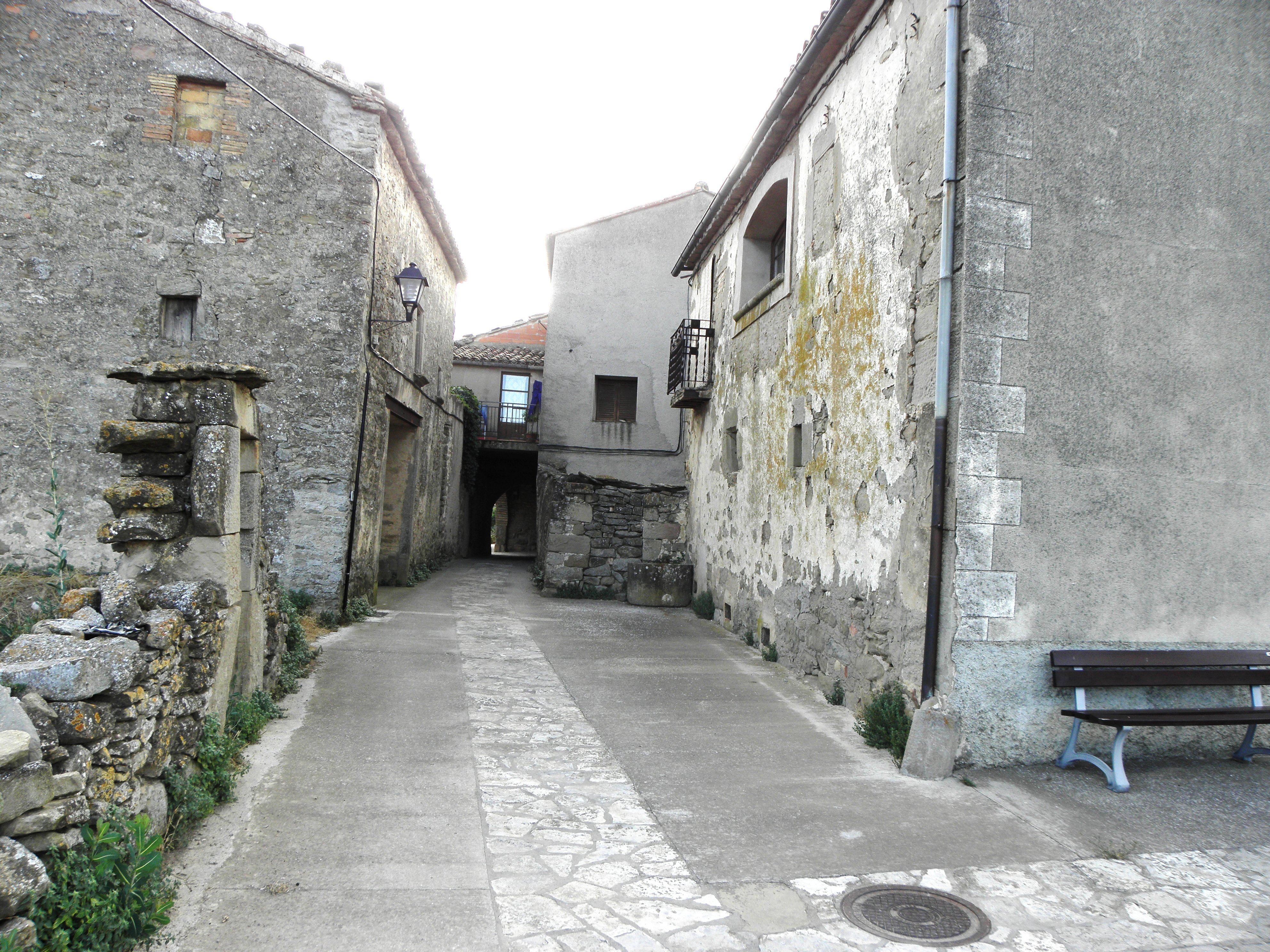 Carrer de Prades de la Molsosa (La Molsosa, Solsonès)